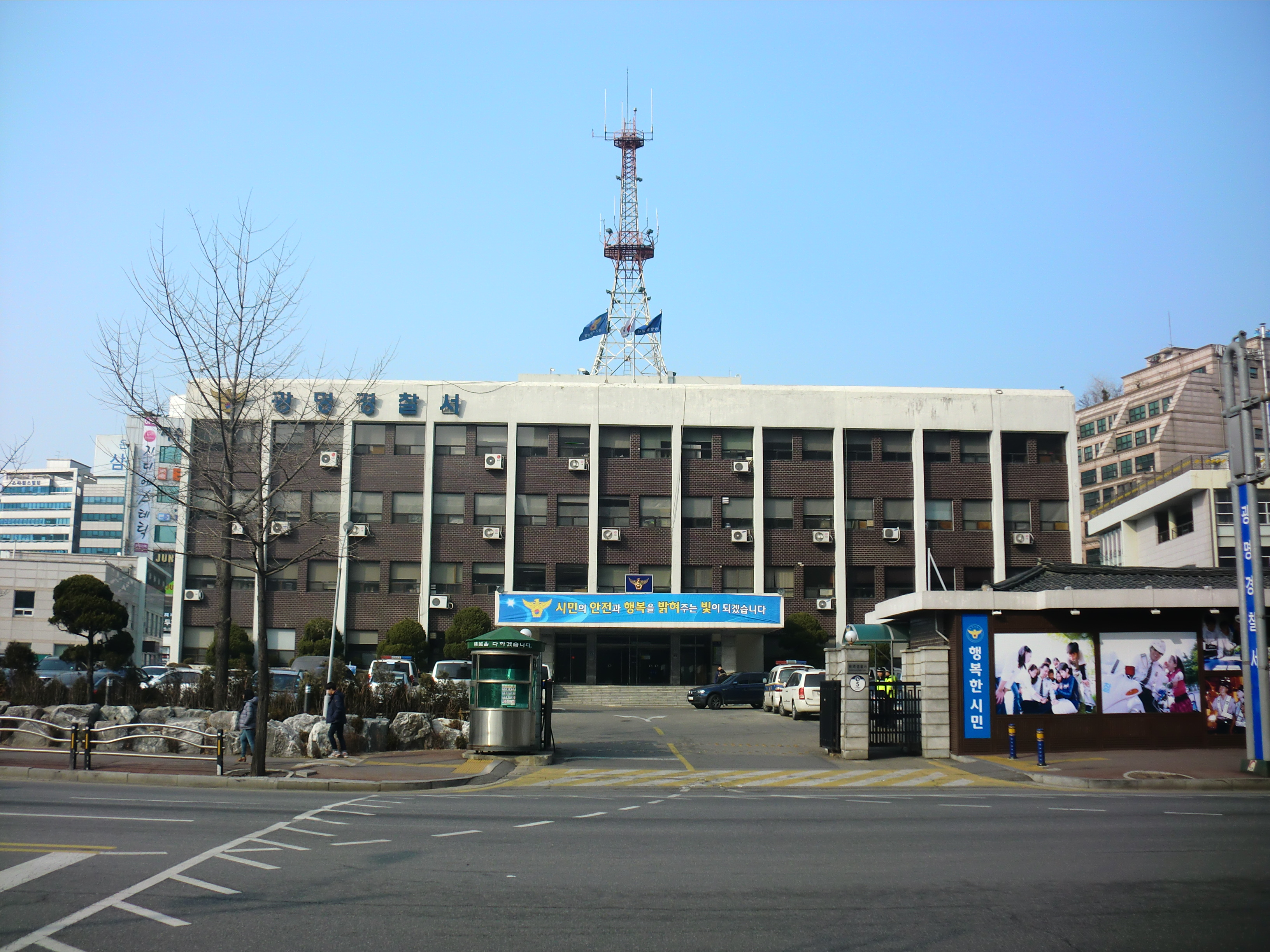 경기도 광명시에 있는 광명경찰서